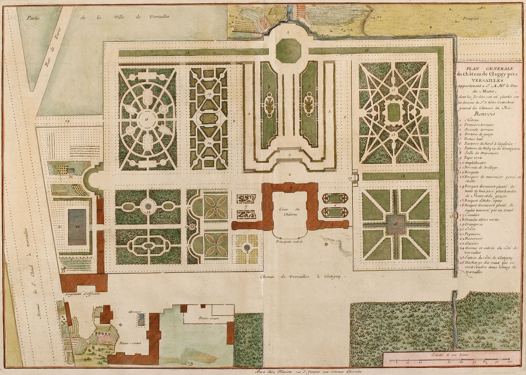 Übersichtsplan des Schlosses Clagny